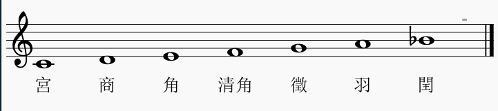 七聲調式中的燕樂音階